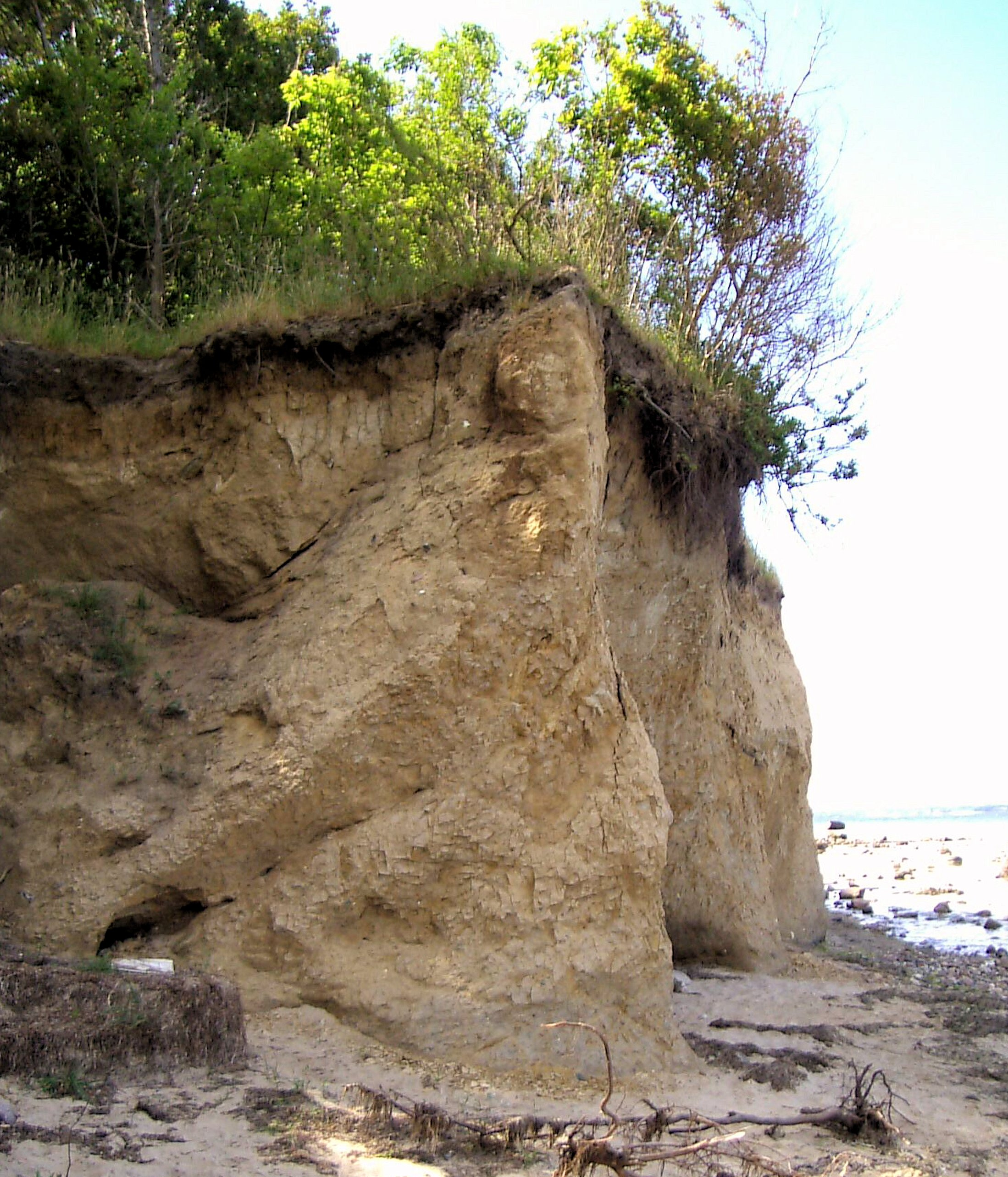 Erosion an der Südwestküste der Insel Poel, Deutschland